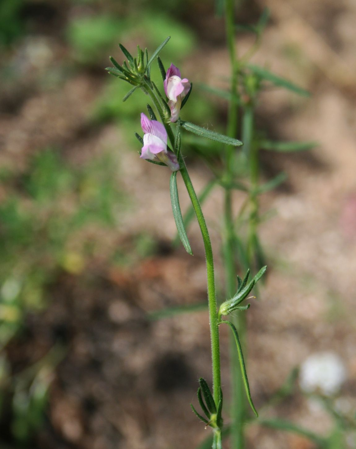 Misopates orontium, Wegerichgewächse (Plantaginaceae) - Italien/Italia/Italy: Kalabrien/Calabria, Prov. Reggio Calabria, Aspromonte, bei San Peri, SSE Scilla